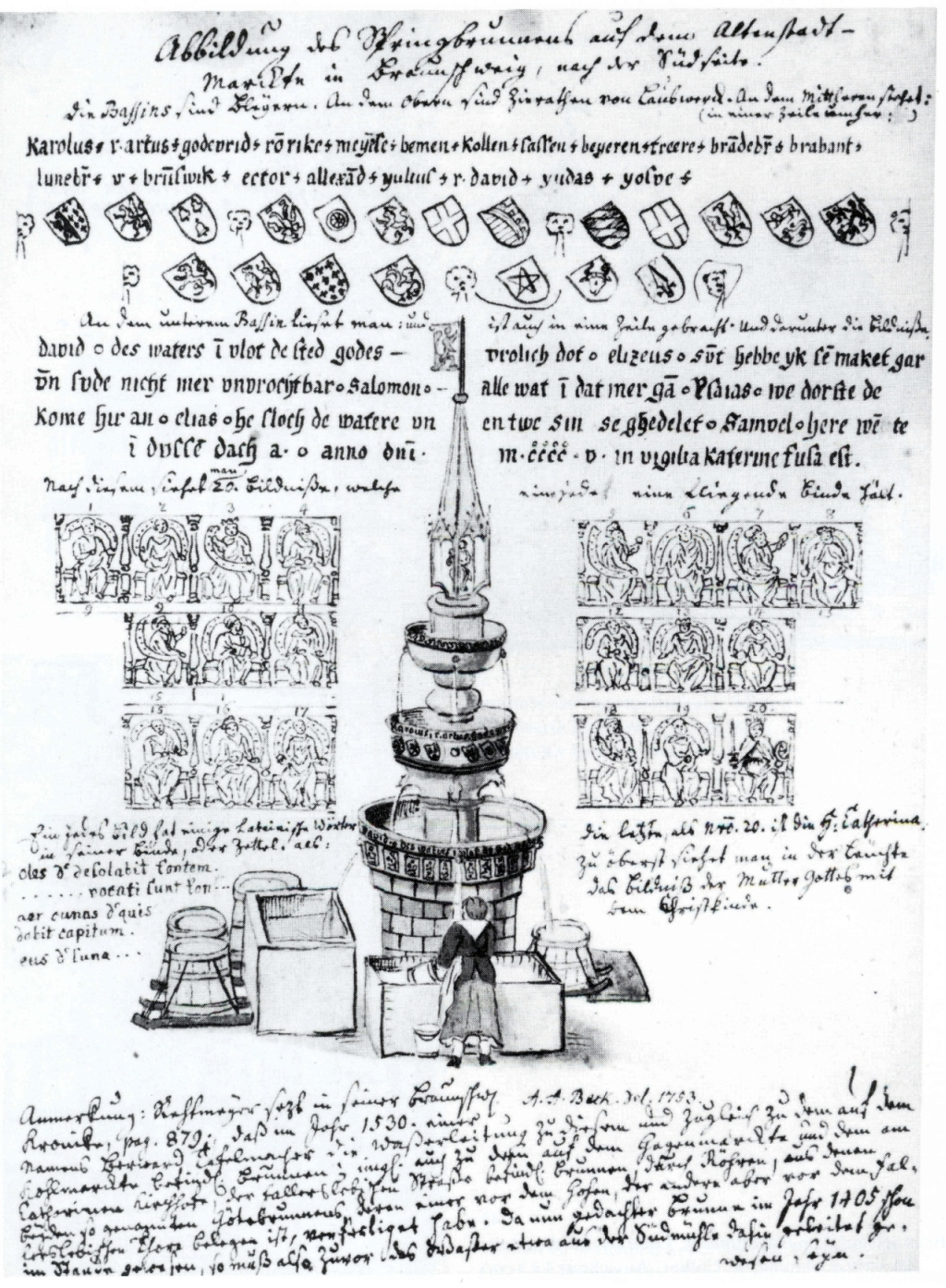 Braunschweig: Tuschzeichnung von Anton August Beck von 1753: Marienbrunnen von Süden. Braunschweig, Germany: Water colour by Anton August Beck from 1753: St. Mary’s Fountain as seen from the south.